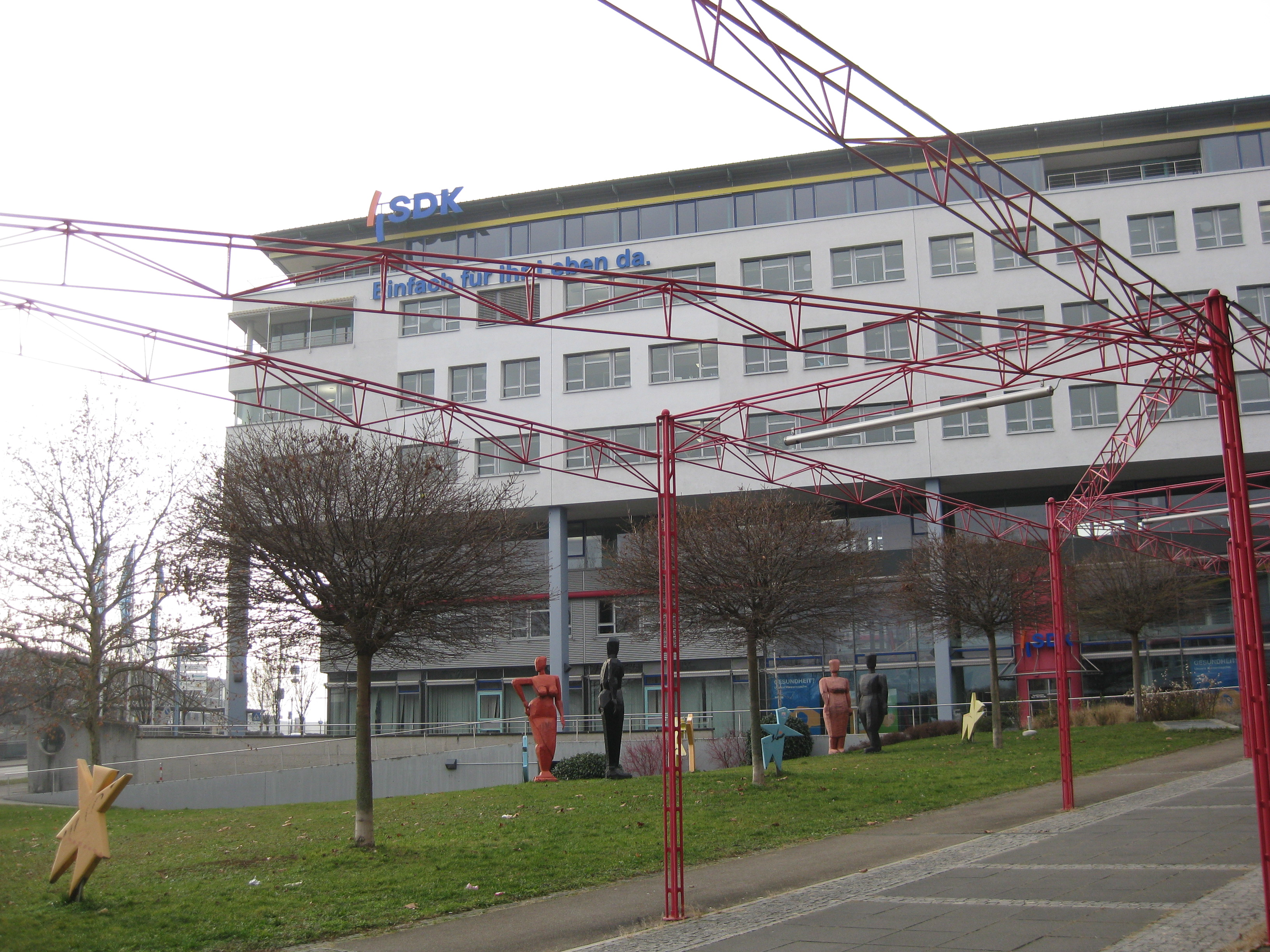 Gebäude der SDK Versicherungsgruppe am Bahnhof Fellbach